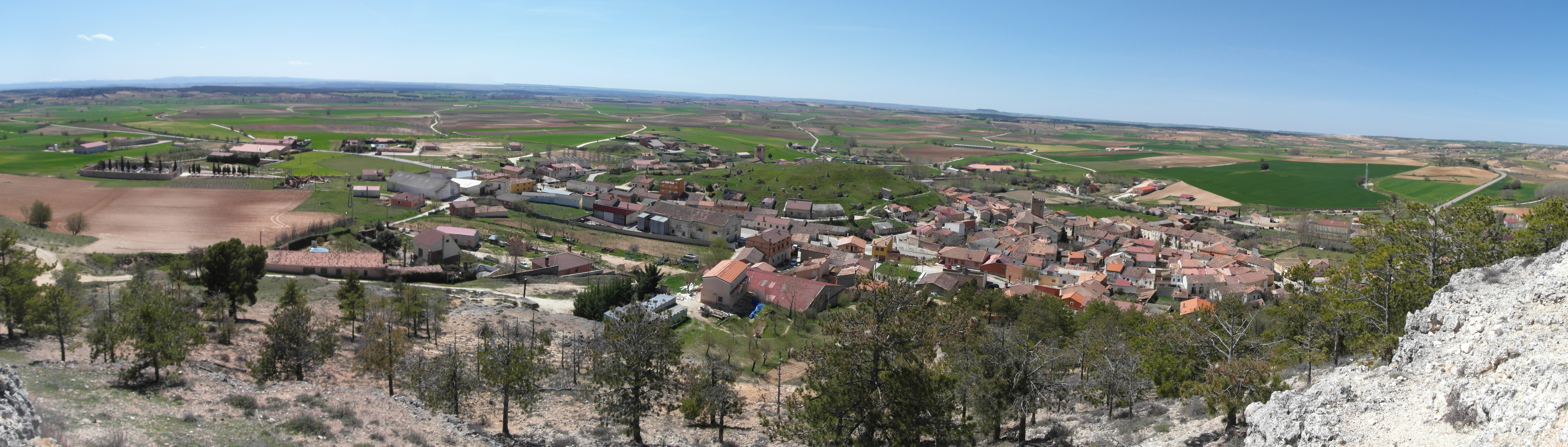 Gumiel del Mercado, Burgos.